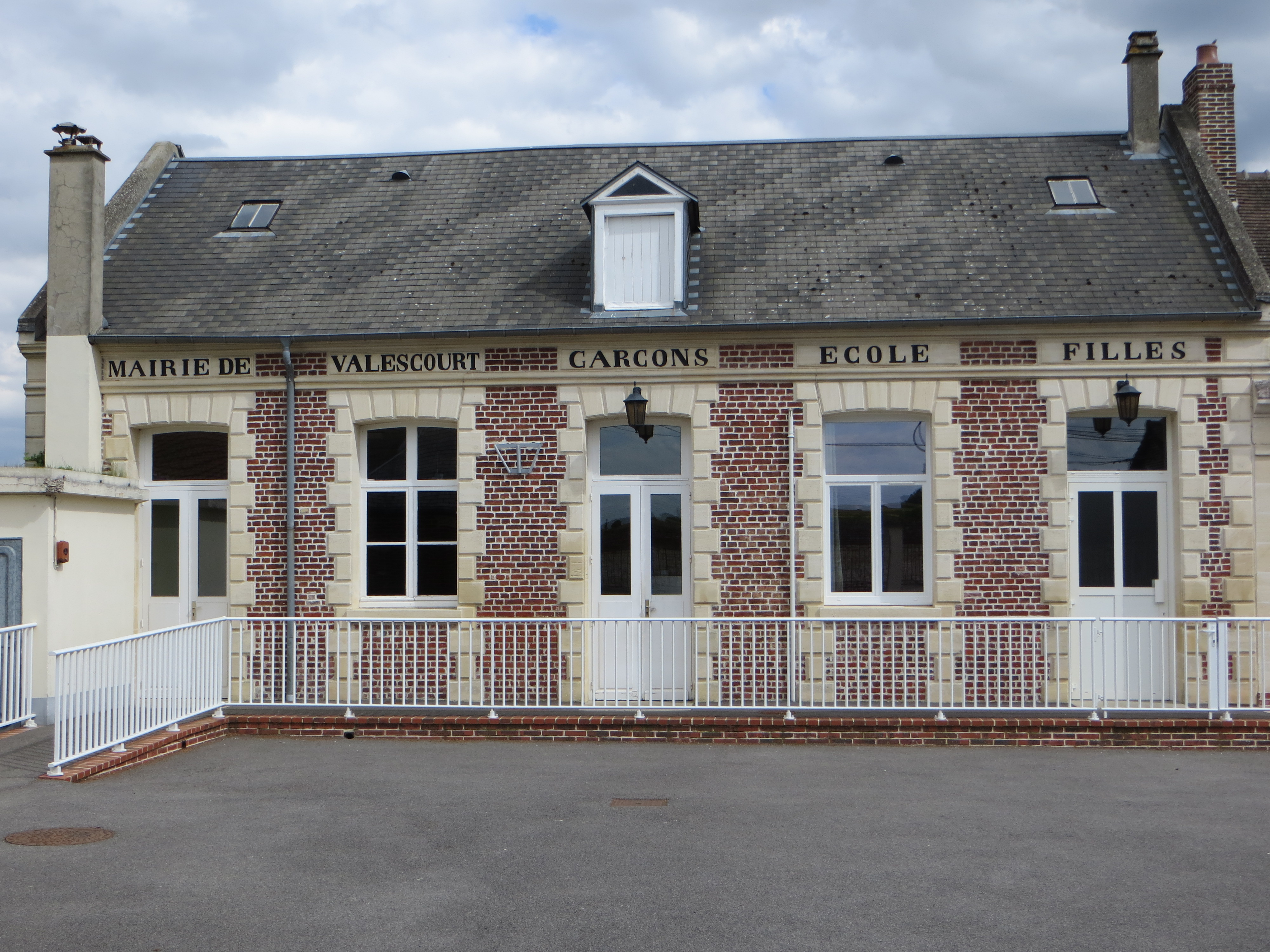 Mairie du village